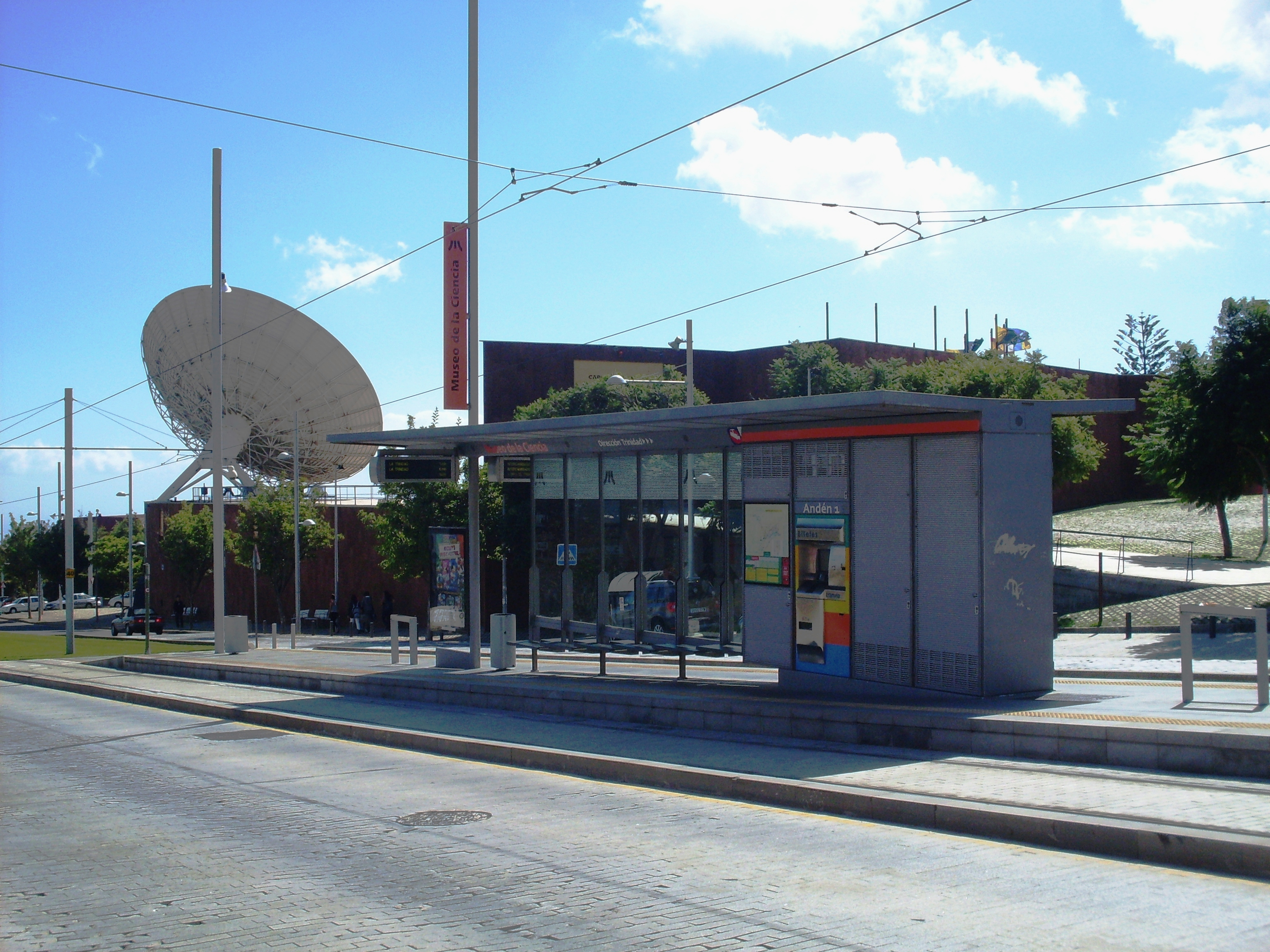 Imagen de la parada "Museo de la Ciencia" del Tranvía de Tenerife.